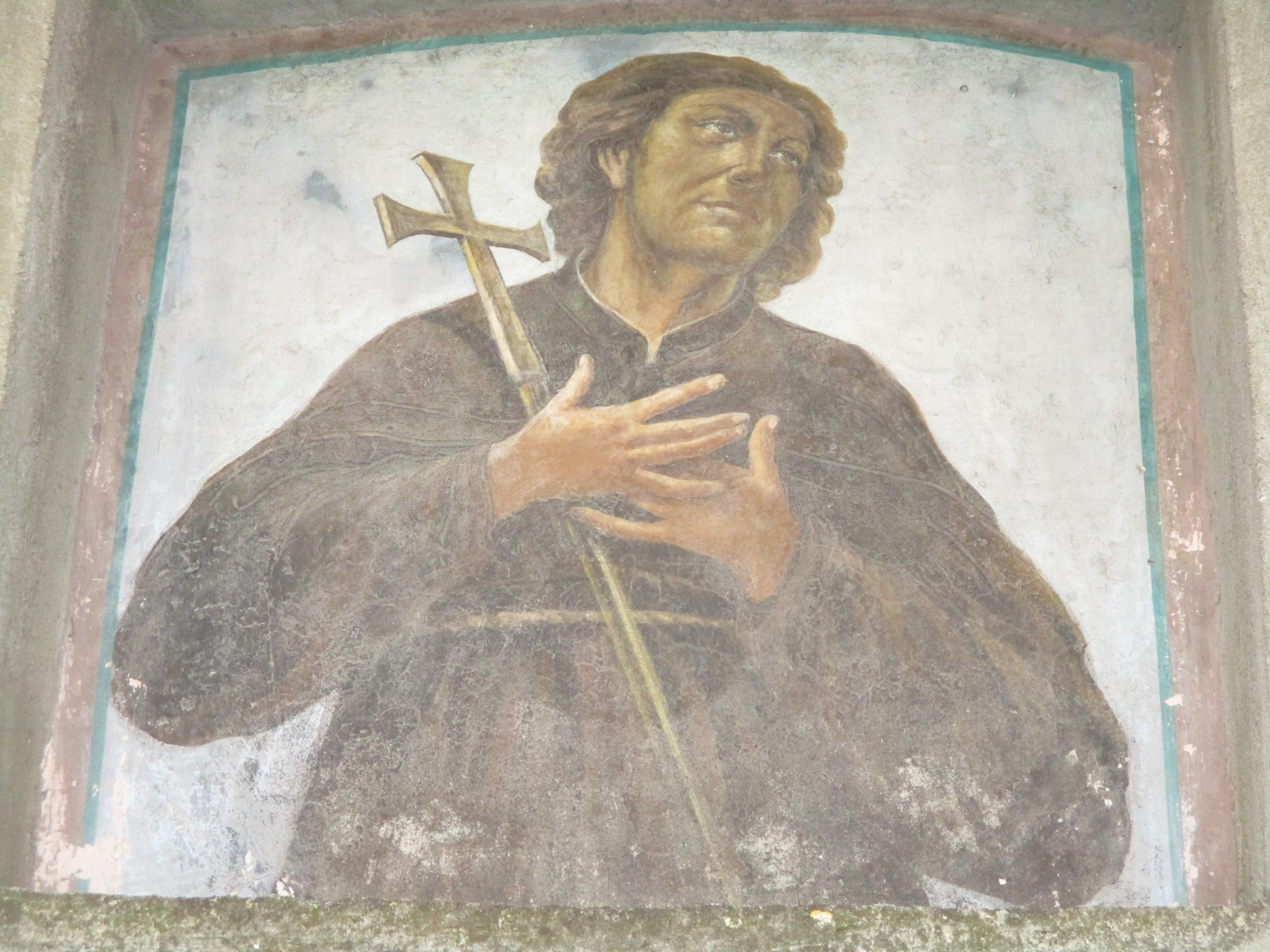 Lunetta dell'oratorio di Trevi nel Lazio in cui è raffigurato il santo